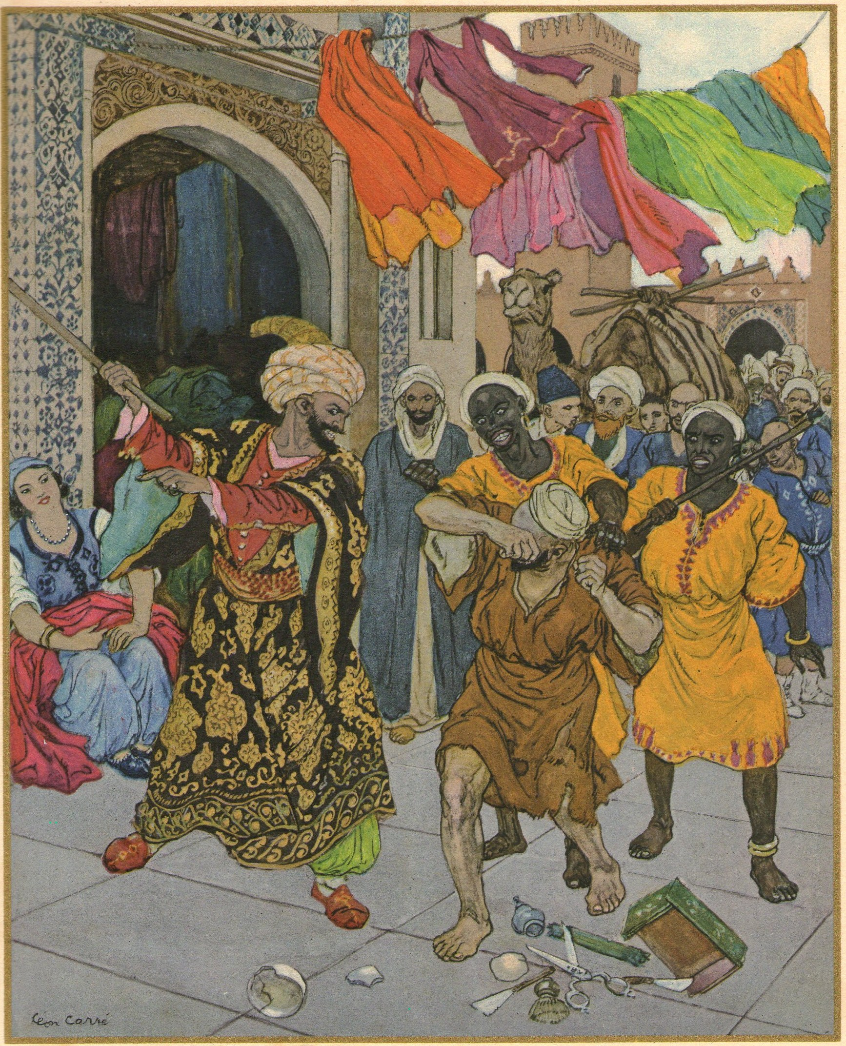 Illustration de l'histoire d'Aboukir et Abousir